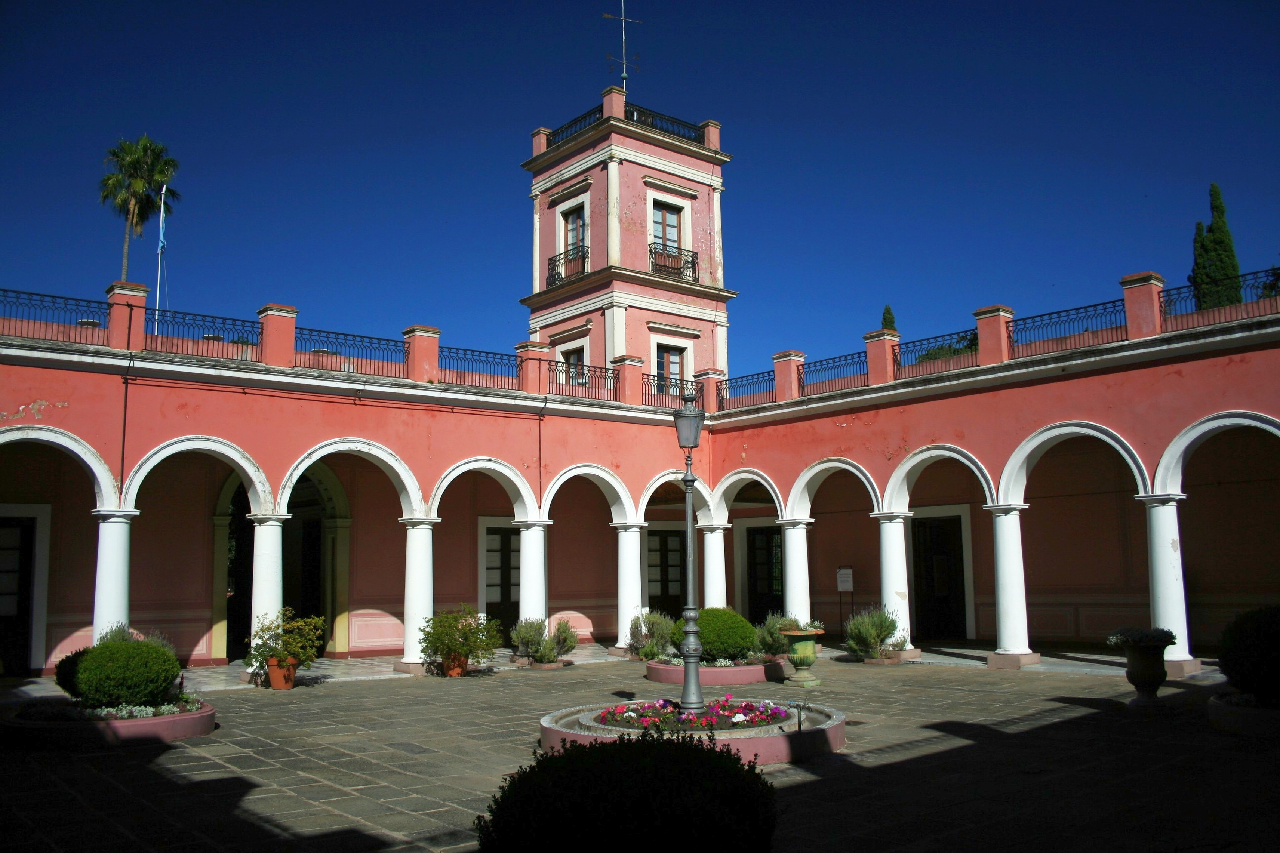 Patio de honor y torre del Palacio San Jose.